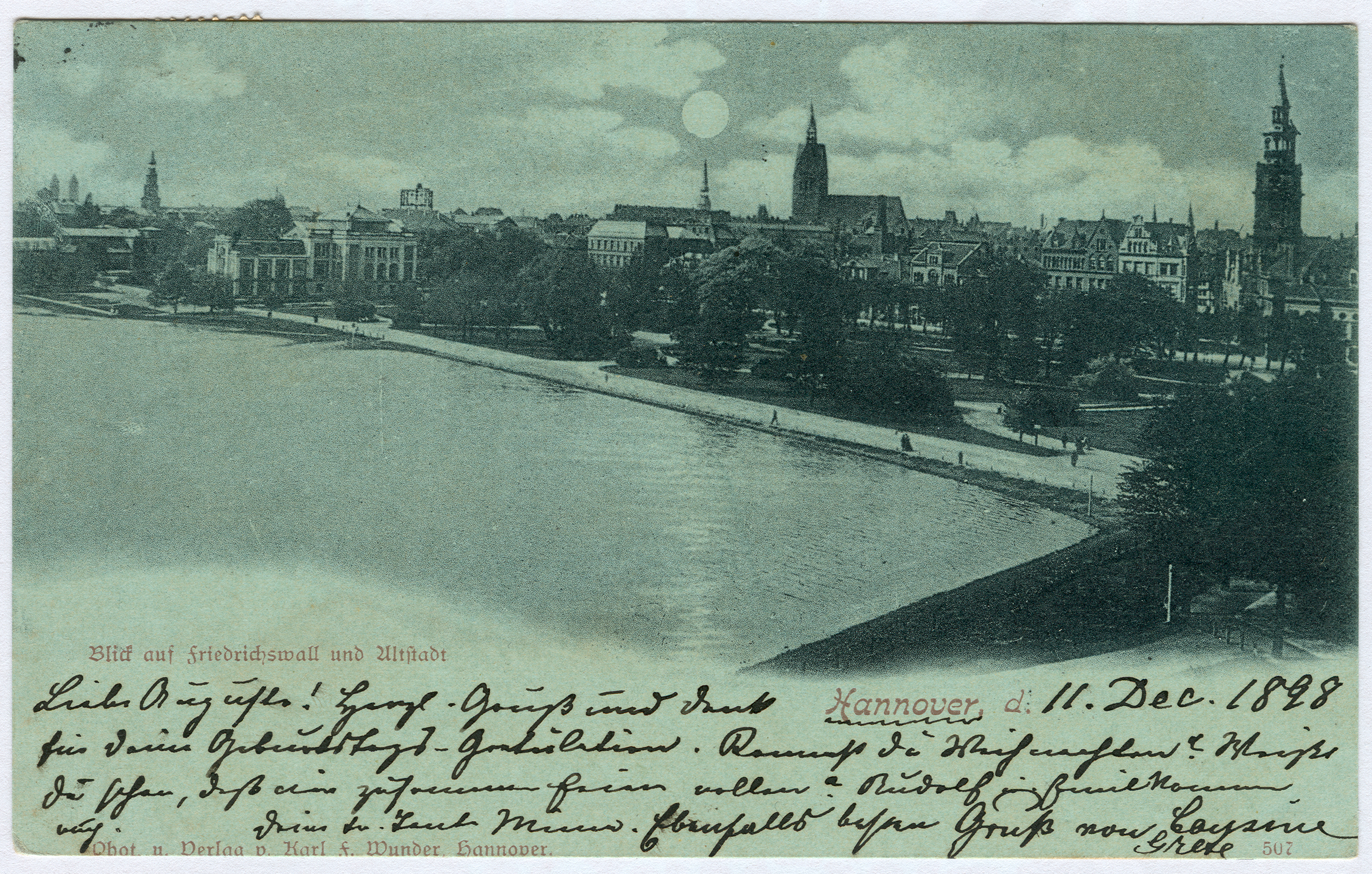 Fotografien von Karl Friedrich Wunder mit Vor- und Rückseite